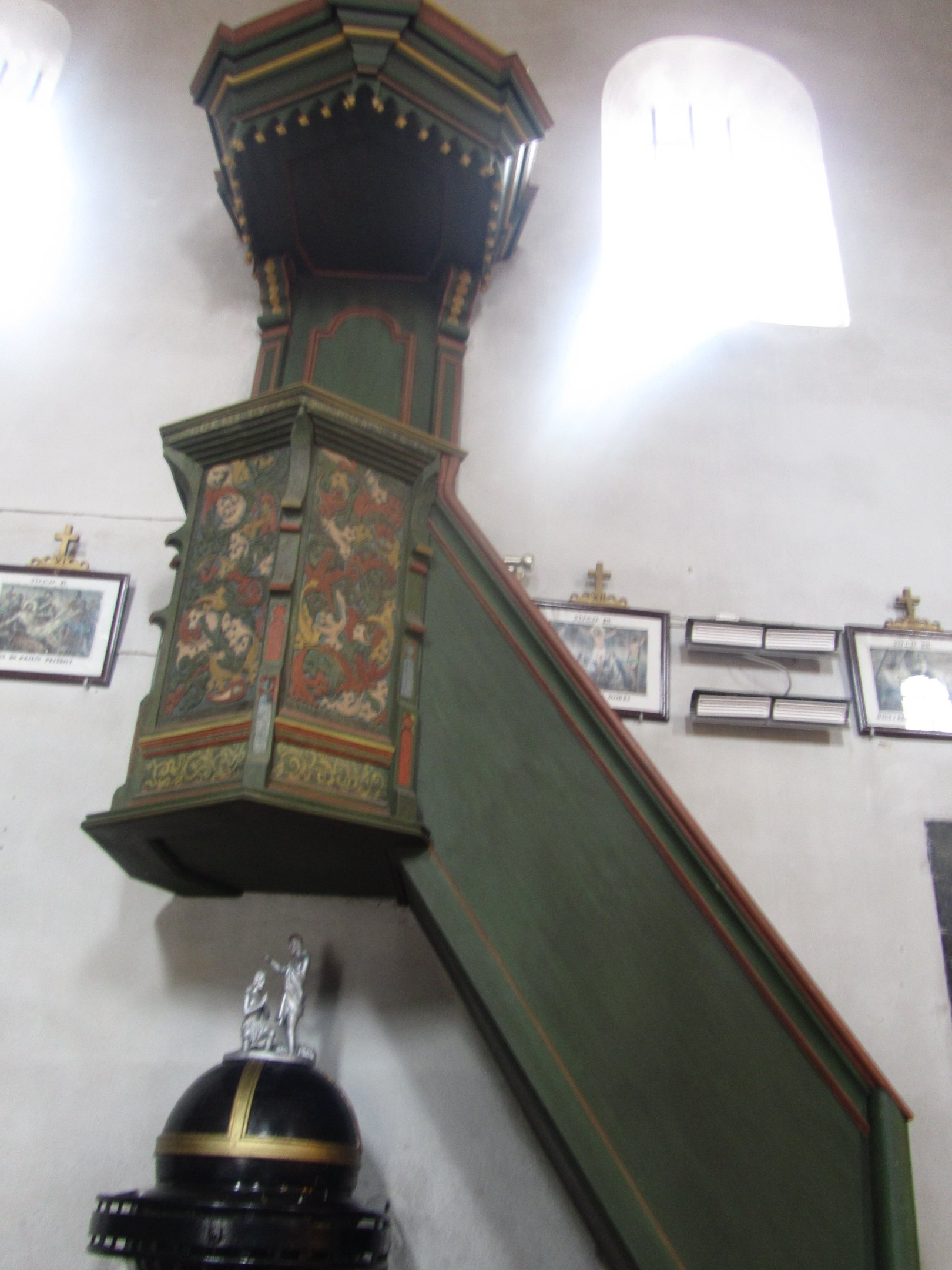 Ambona w kościele wysocickim